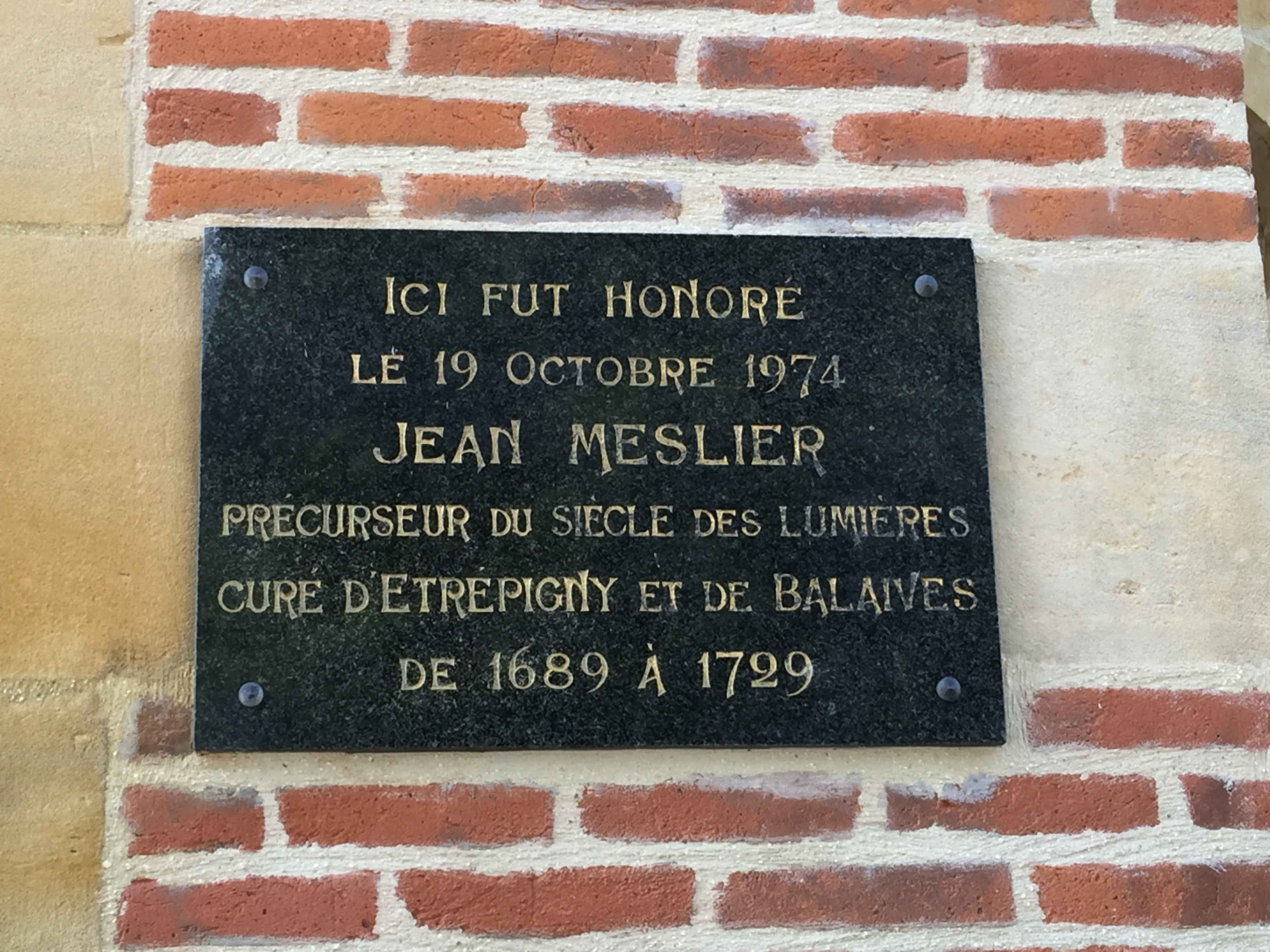 Plaque commémorative Jean Meslier, sur la mairie d'Étrépigny